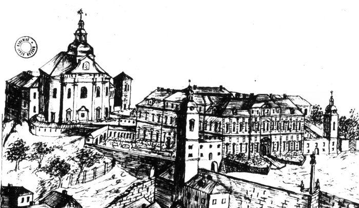 Rychnov nad Kněžnou, veduta, konec 18. st